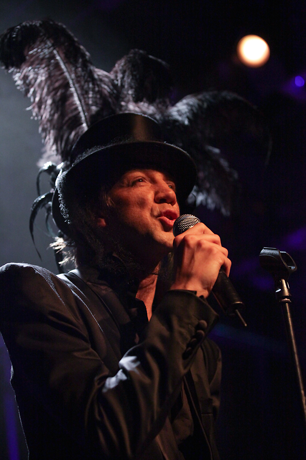 Sven Ratzke (1977) is een Duits-Nederlandse zanger en entertainer.